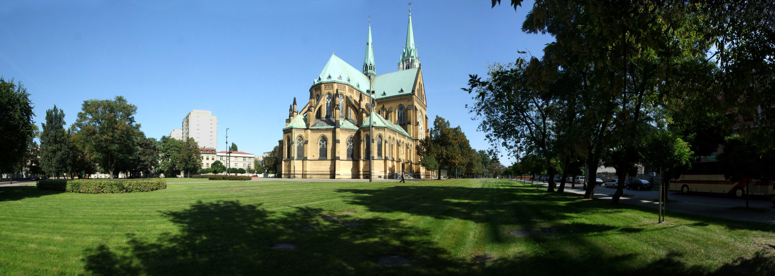 Widok na Archikatedrę Łódzką